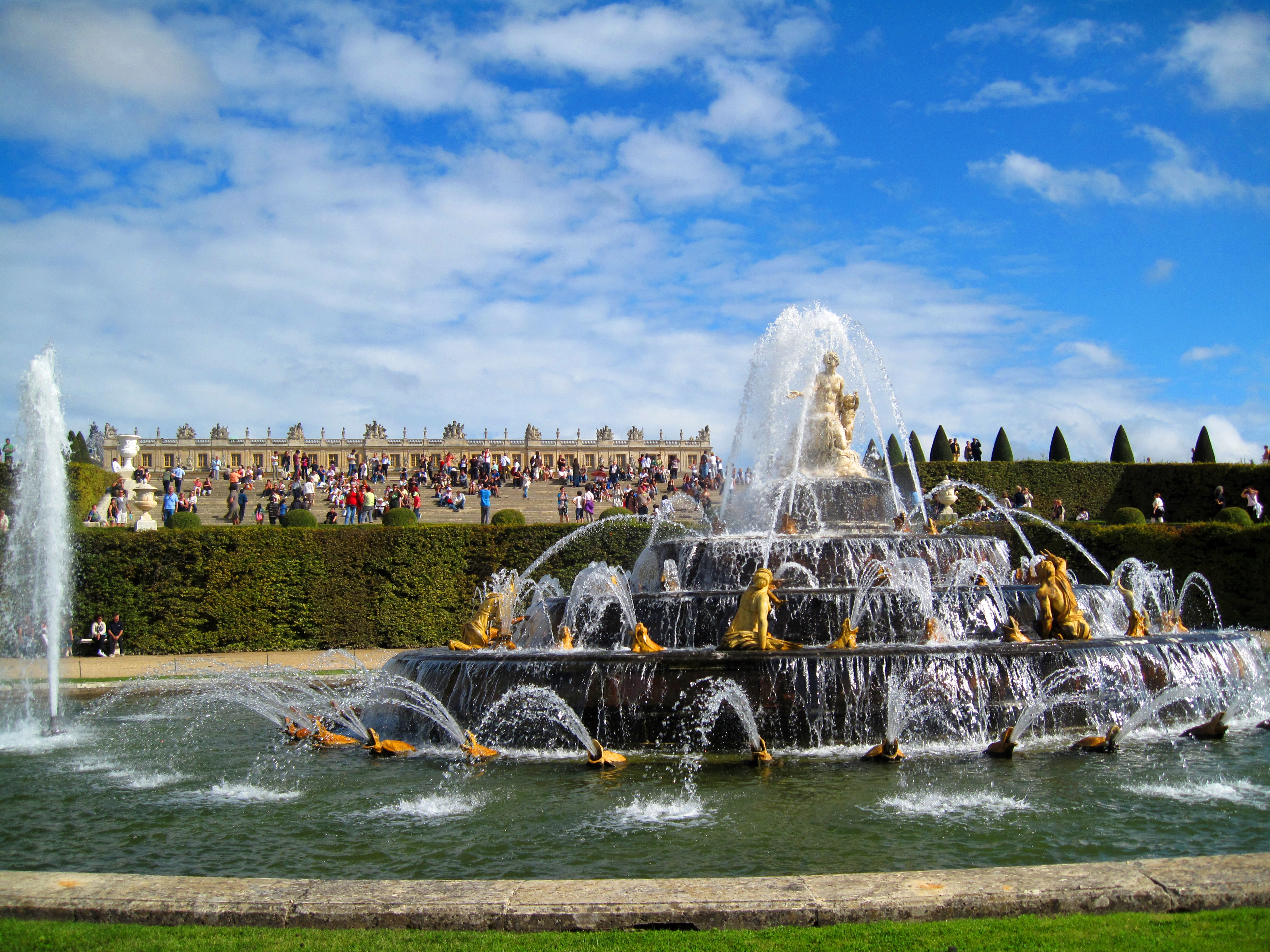 Springbrunnen im Schlosspark von Schloss Versailles .